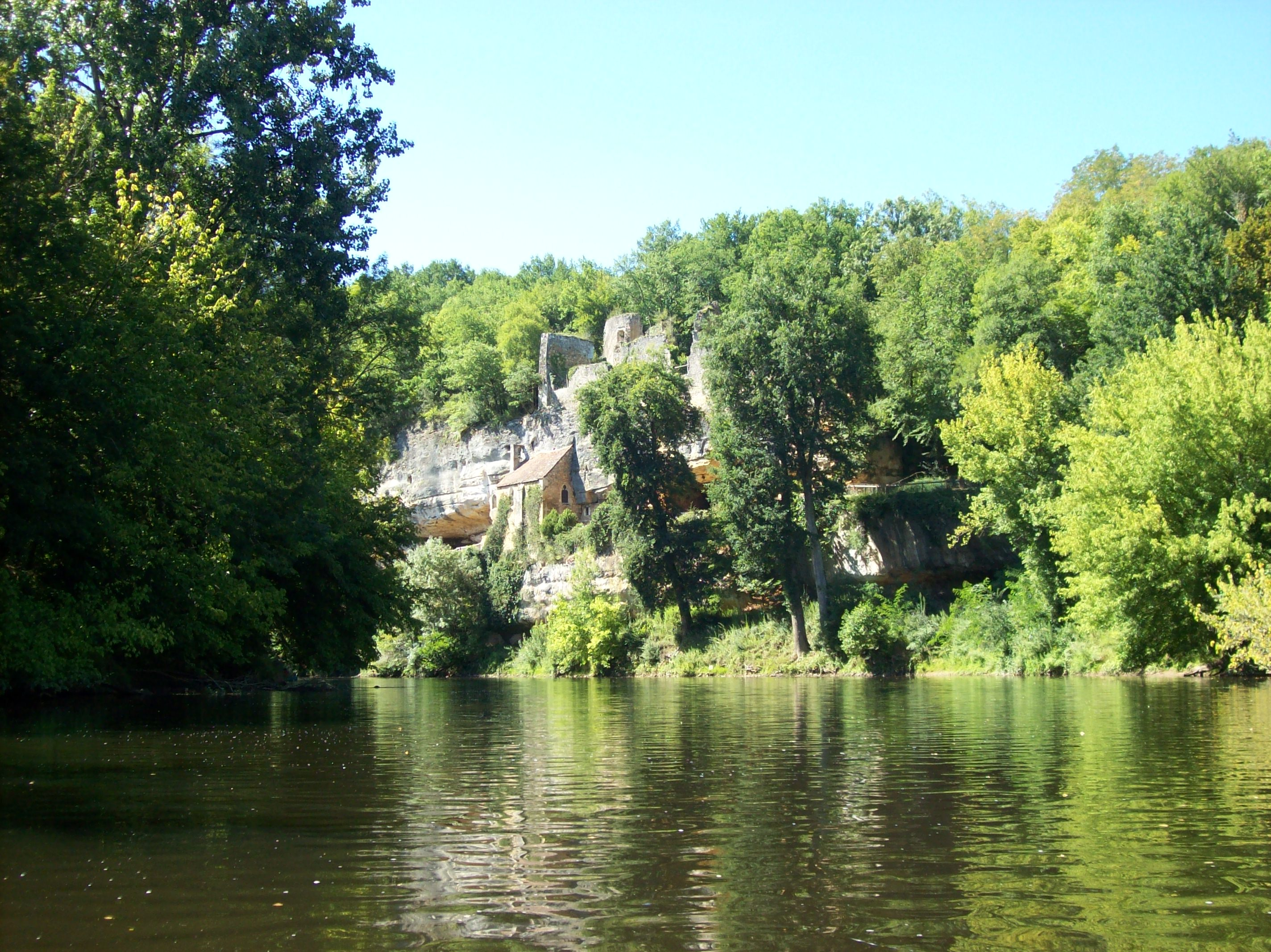 La Madeleine vom Fluß aus gesehen